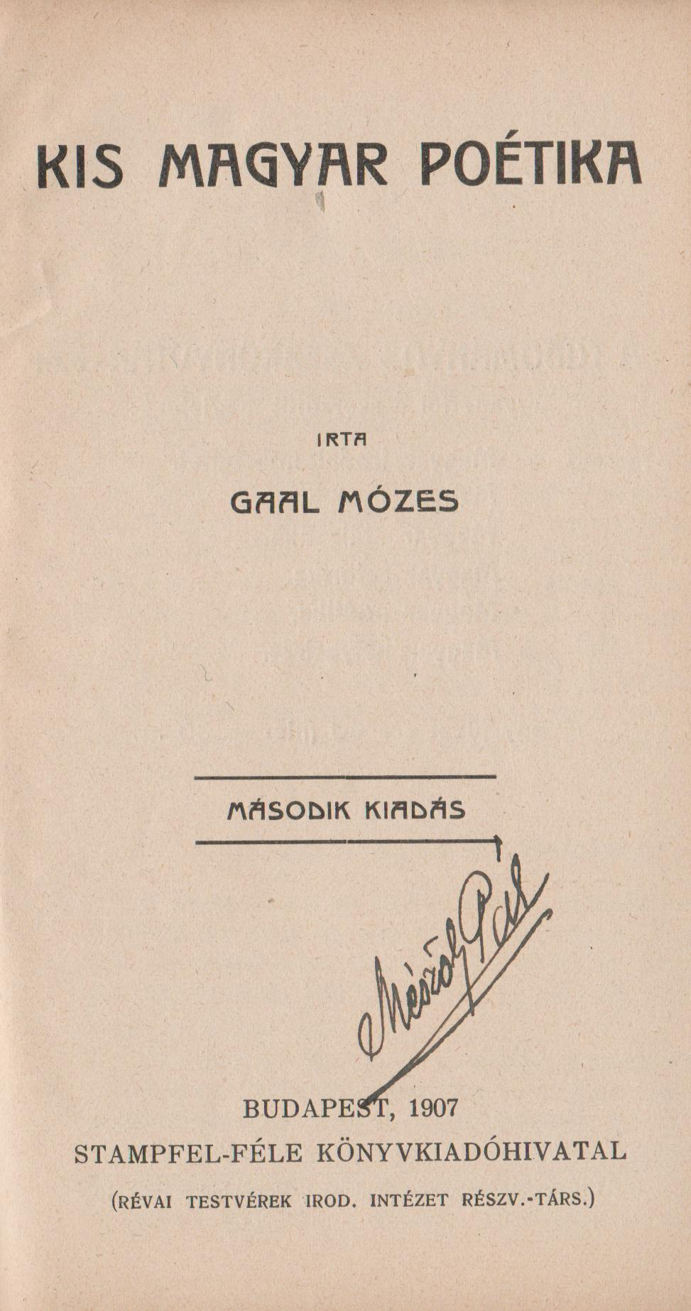 Az adott mű címlapja.